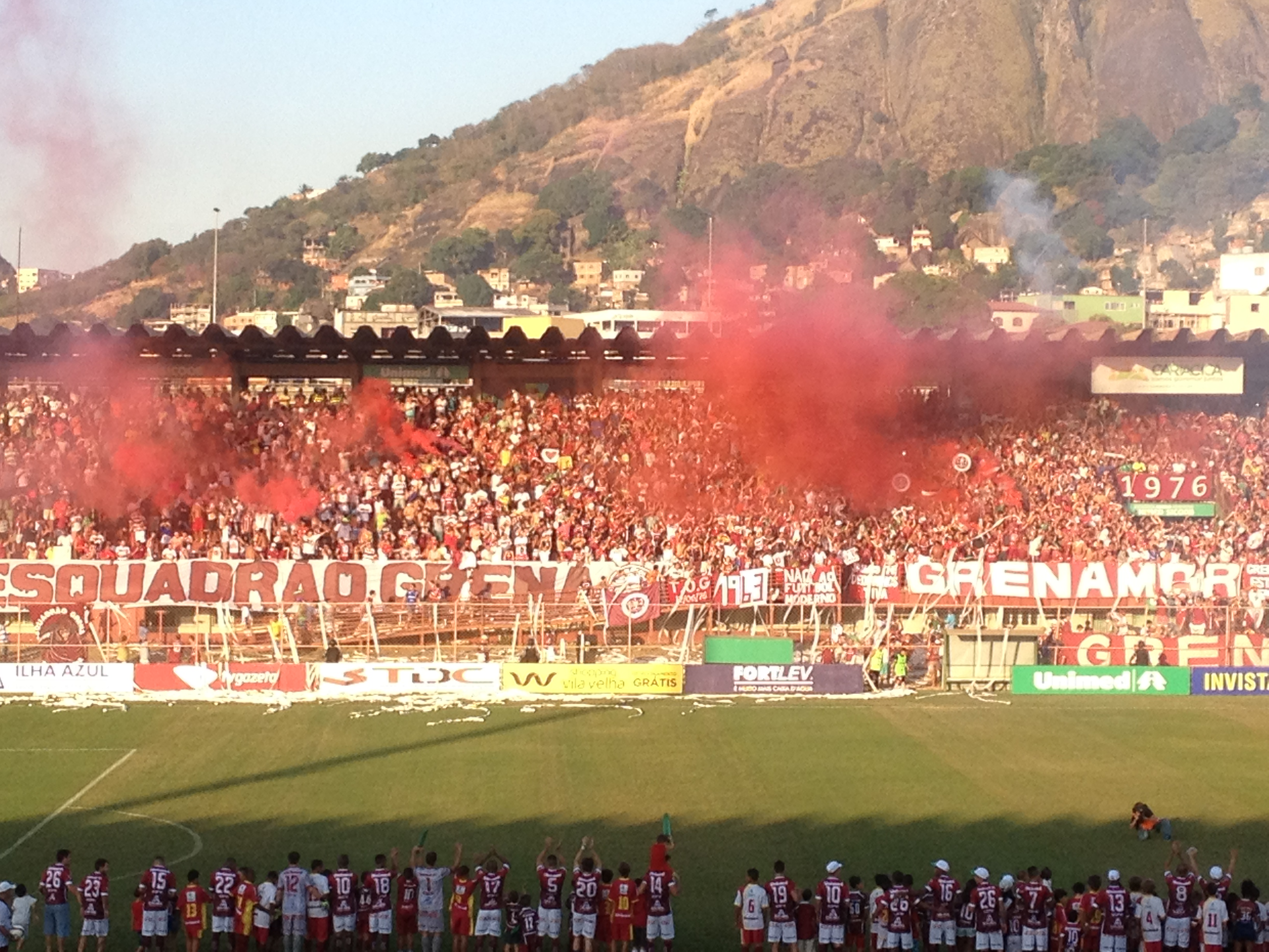 Equipe e torcida da Desportiva Ferroviária na Final do Campeonato Capixaba de 2016.